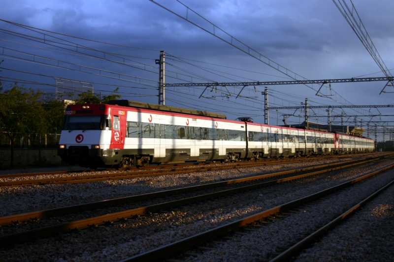 Renfe EMU 447 in travel from l'Alcúdia de Crespins to València-Nord passing entering to Silla (València)